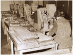 Fabrication de verres.jpg